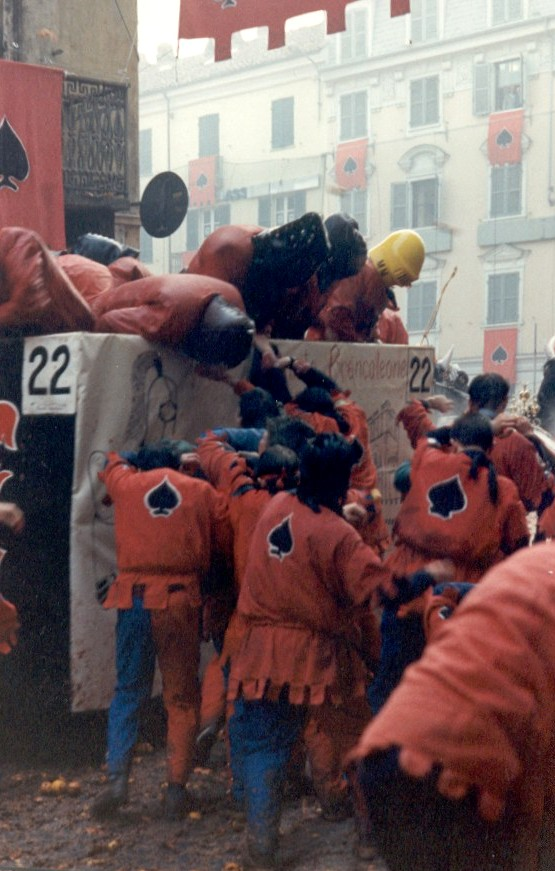 foto che ritrae la famosa battaglia delle arance, del carnevale di Ivrea.